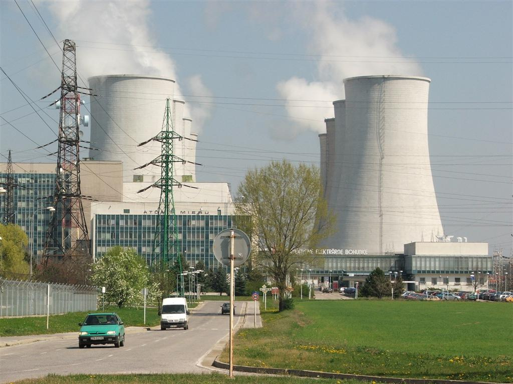 Atómové elektrárne Bohunice - vstup (13.4.2007)